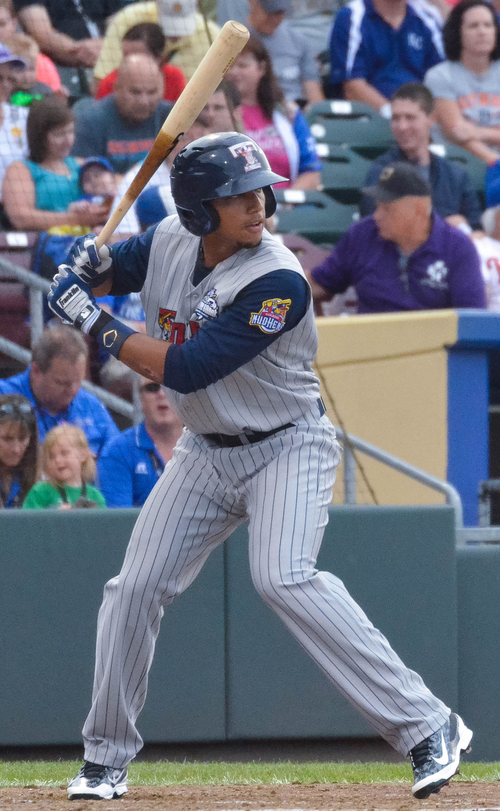 Dixon Machado